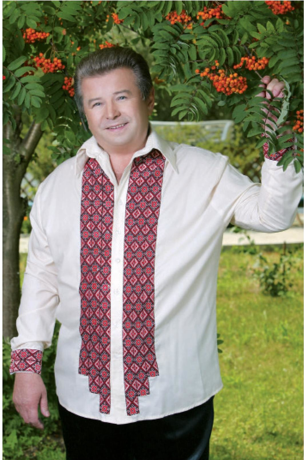 Михайло Поплавський